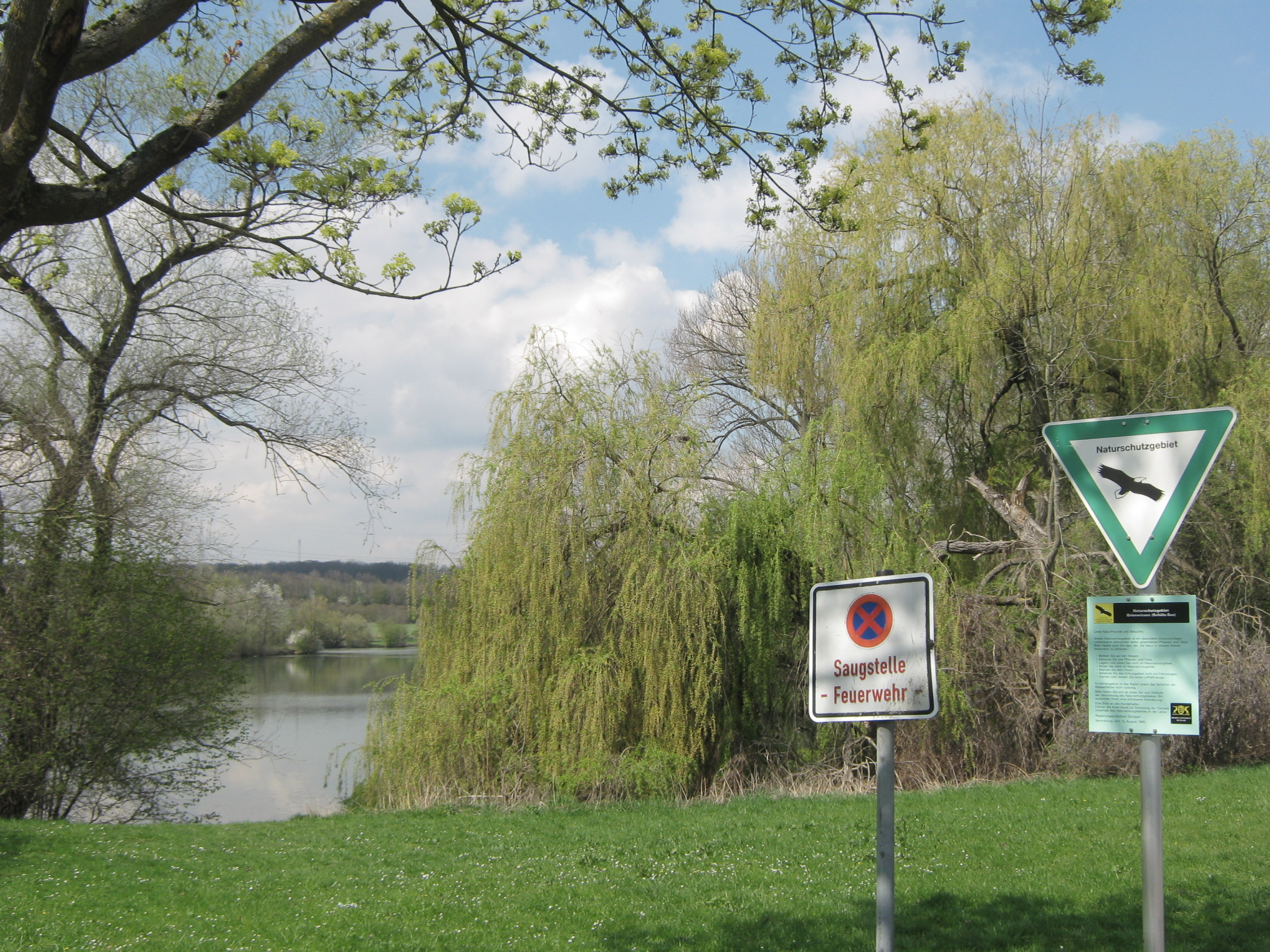 Naturschutzgebiet Am Rank (Römsee) bei Unterensingen im Neckartal.